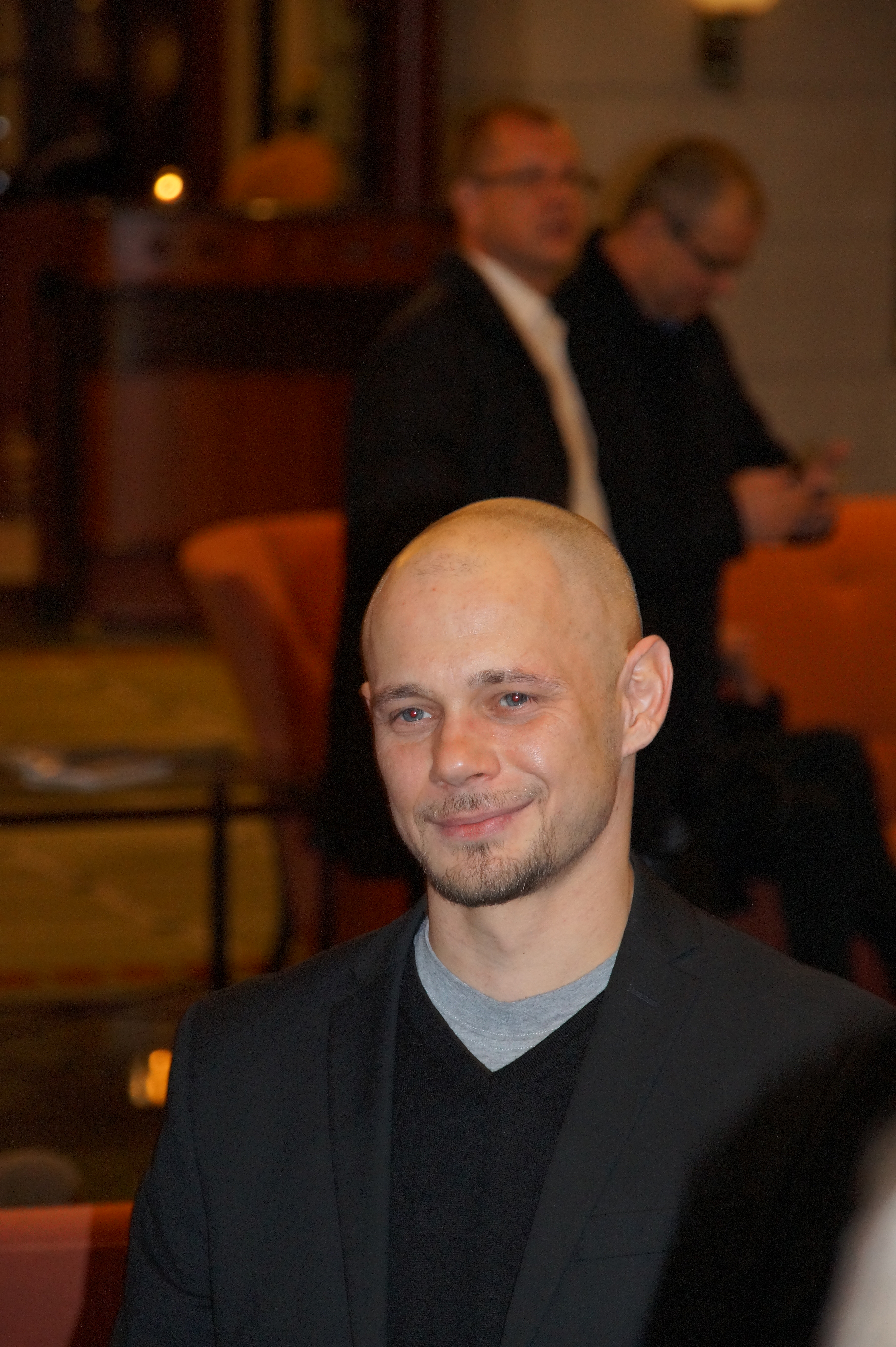 Antonio Wannek beim Askania Award 2016.